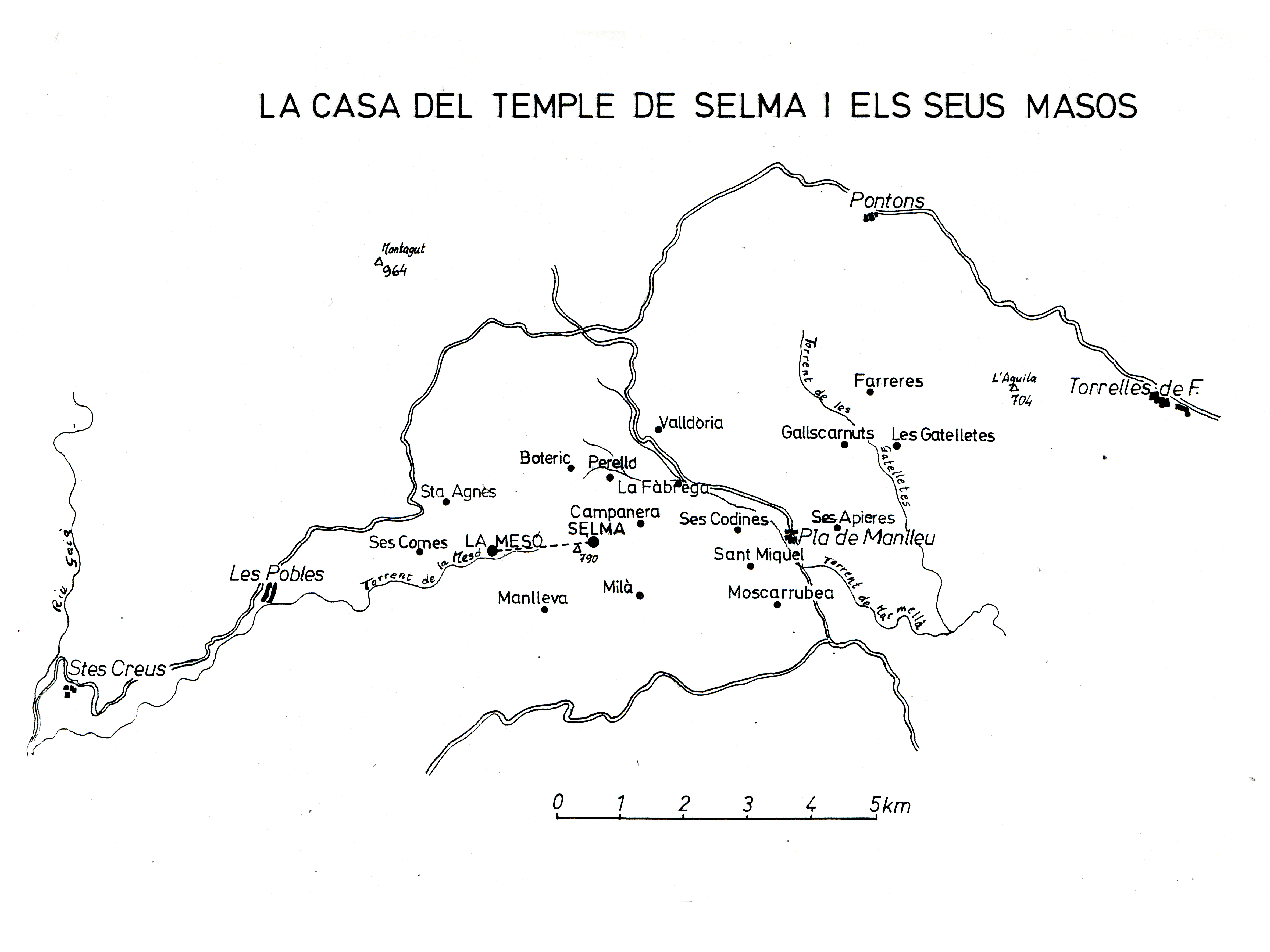 Selma (Alt Camp). Mapa de la comanda templera de Selma i els seus masos. (J. Fuguet, 1995, p. 265).